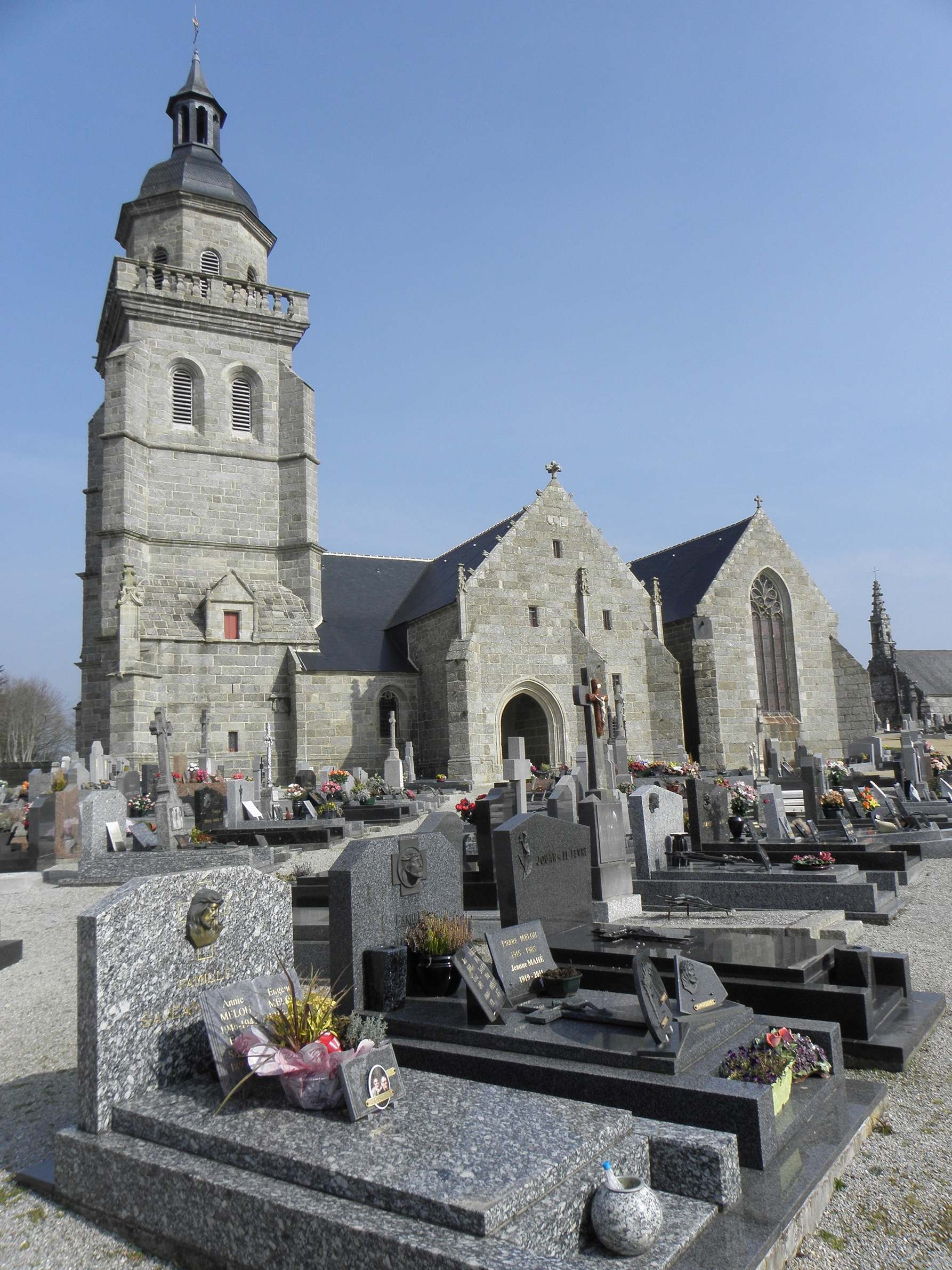 Vue méridionale de l'église Saint-Gilles sise à Saint-Gilles-Pligeaux (22).